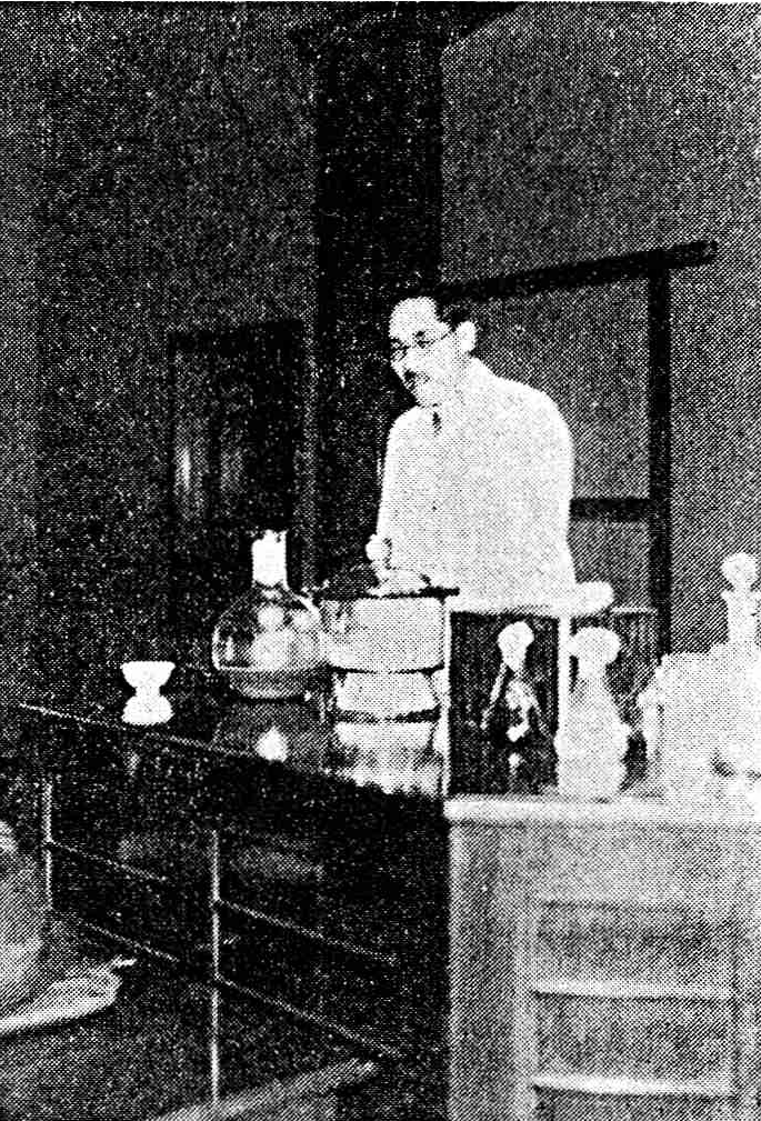 『南洋水産・第29号』掲載の水試実験室での山本祥吉（同誌15ページ）